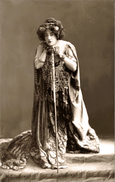 Anna Bahr-Mildenburg en Clytemnestre dans la représentation d'Elektre au Wiener Hofoper, "une matronne monumentale armée d'un long bâton, au léger strabisme convergent et aux yeux alourdis d'ornements métallique" (W.G. Sebald, La description du malheur, p. 89).